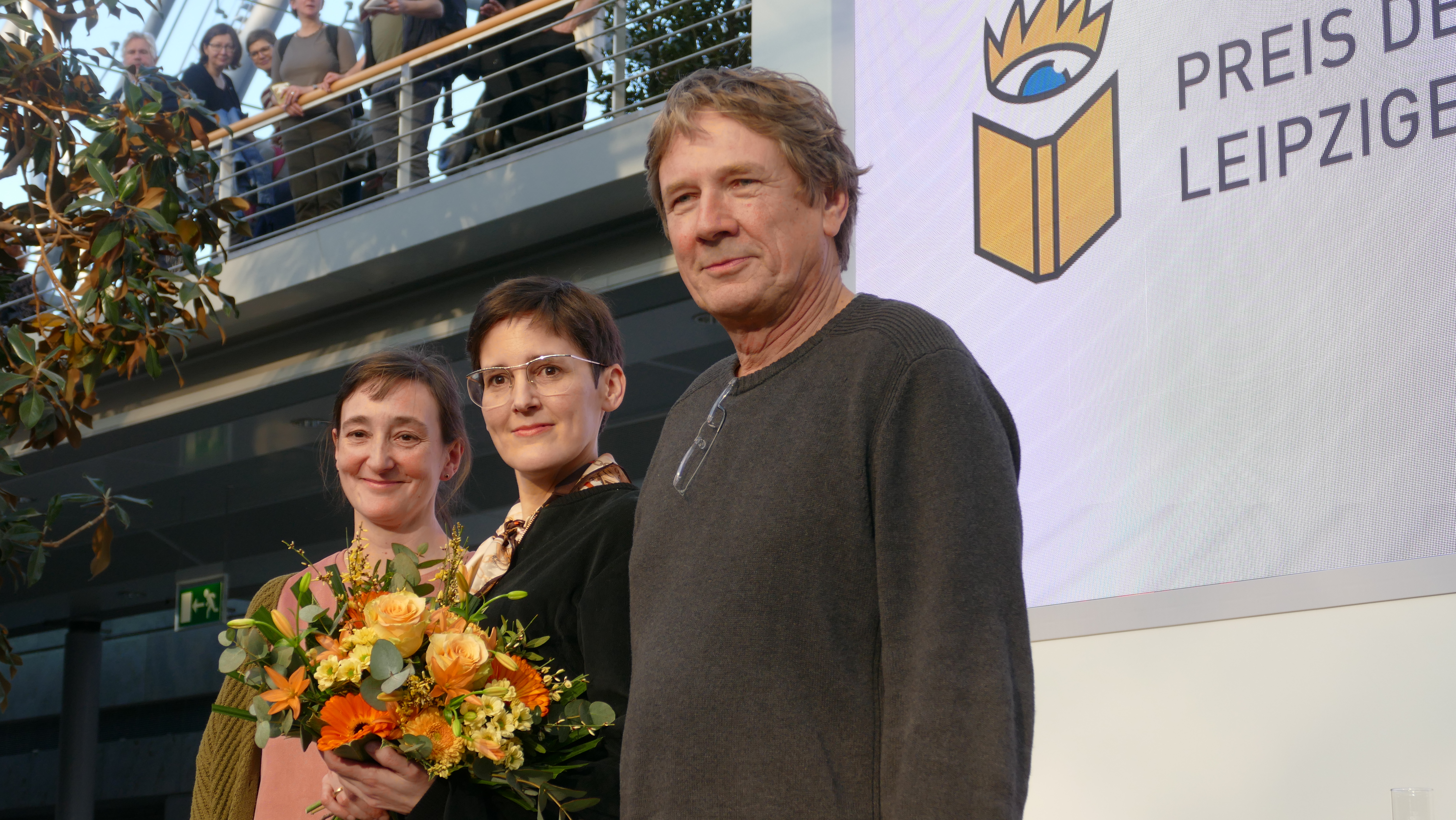 Preis der Leipziger Buchmesse 2019 - Die Preisträger von links: Eva Ruth Wenne (Übersetzung), Anke Stelling (Belletristik) und Harald Jähner (Sachbuch)